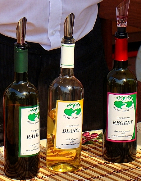 Die Weine aus dem Santal